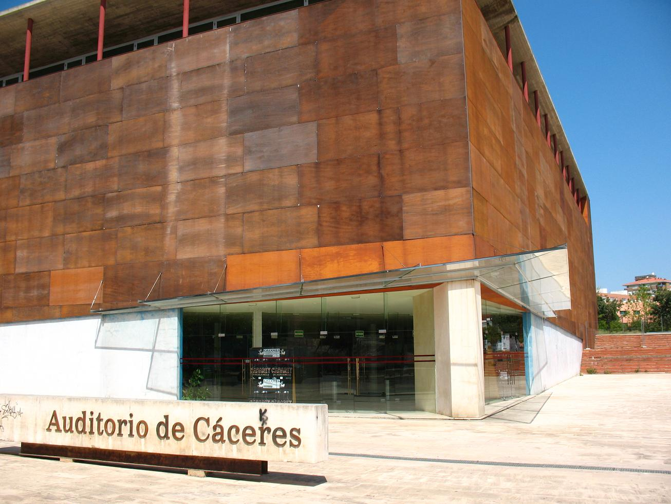 Auditorio de Cáceres